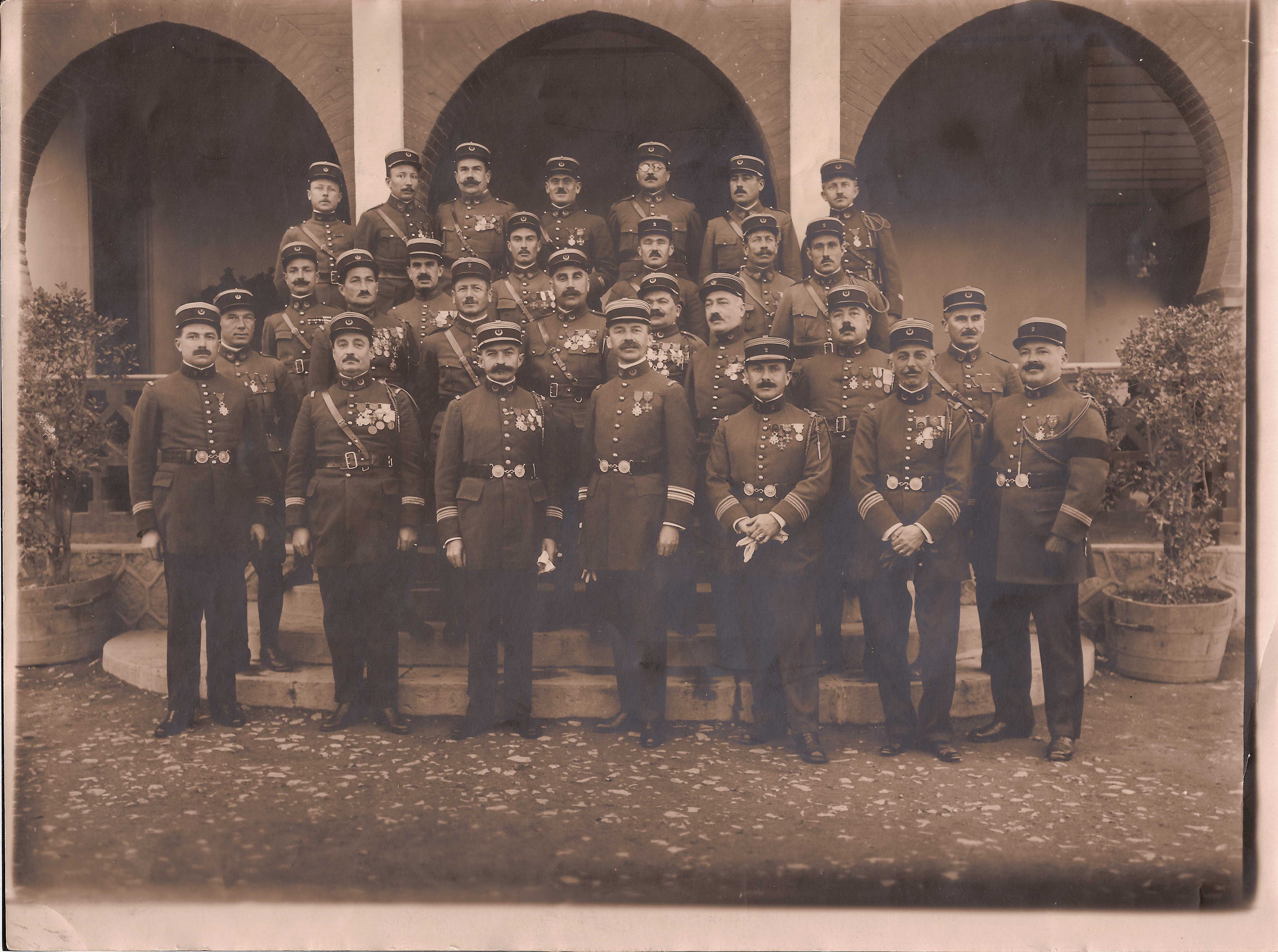 Fernand Lescanne et les officiers du 2ème régiment de zouave - Janvier 1928